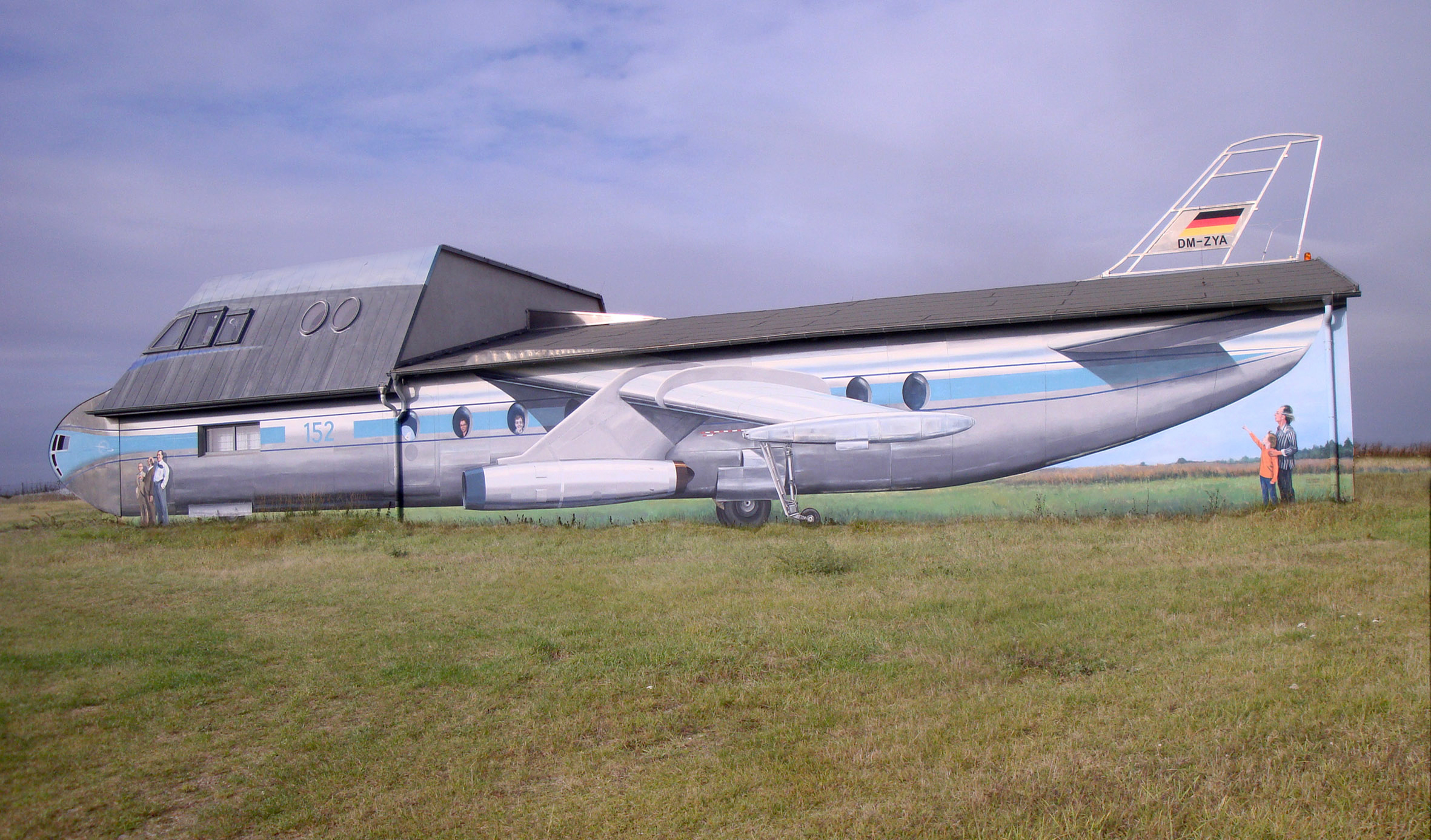 Ein ehemaliger Schweinestall in Gellmersdorf (Uckermark) wurde 2012 von Wilfried Bergholz zum FIZ (Flugsportinformationszentrum) umgebaut – Das Gebäude ist (mit Flugzeugnase) 31,40 m lang – also genauso groß wie die Baade 152, die 1958 in der DDR (Dresden) gebaut und eingeflogen wurden – als erstes deutsches Düsenflugzeug für Passagiere.